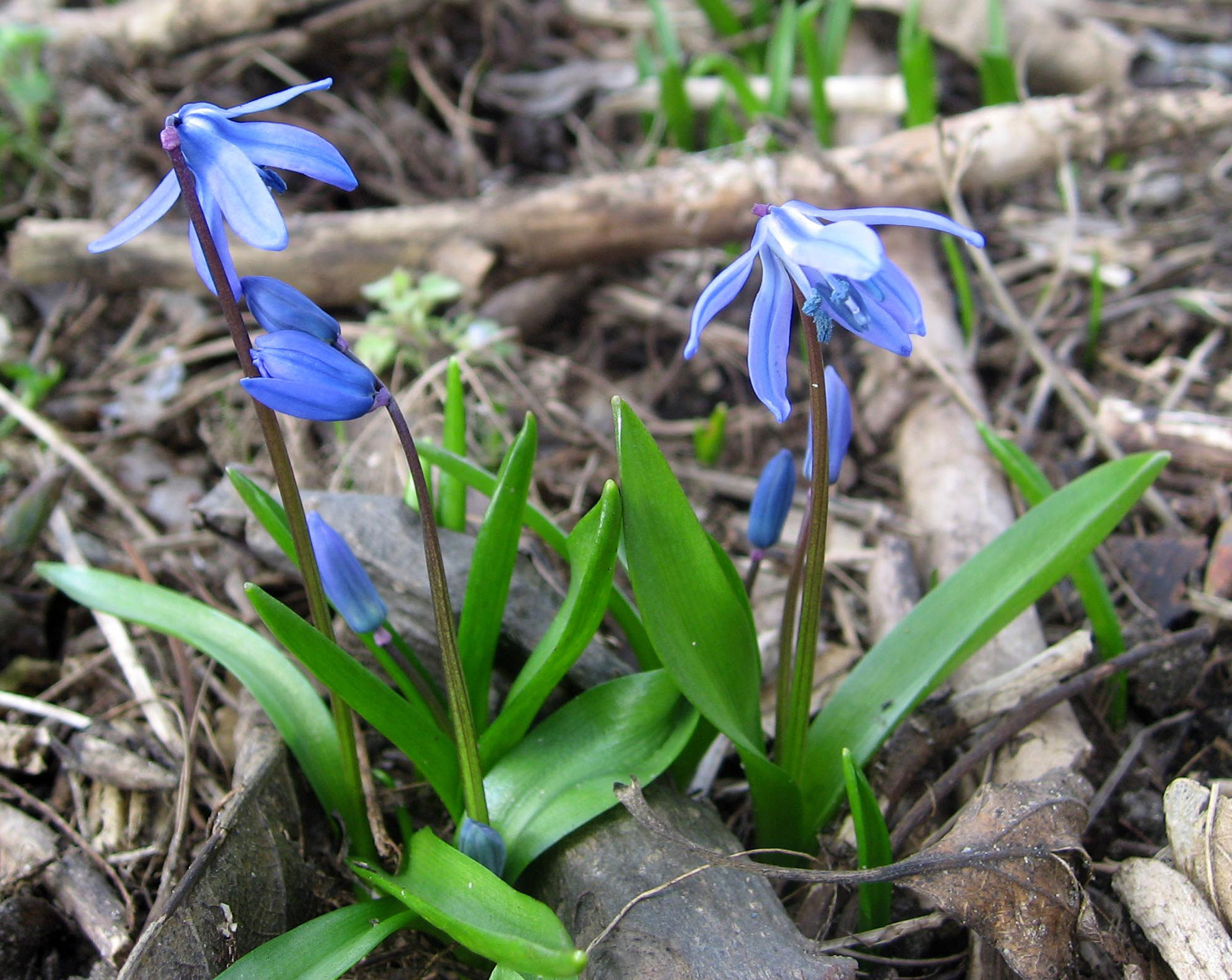 Mäerzblimmchen (Scilla bifolia)